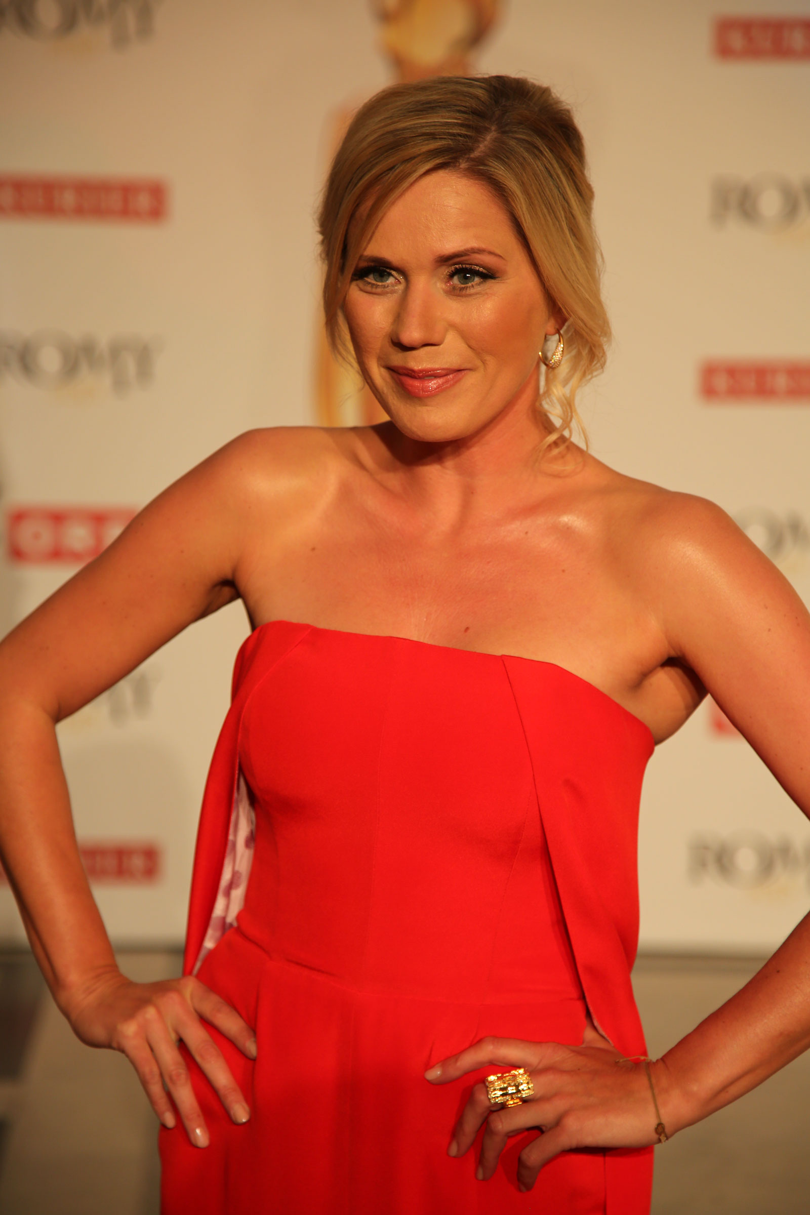 Setzer_Johanna-Fernsehmoderatorin-2960